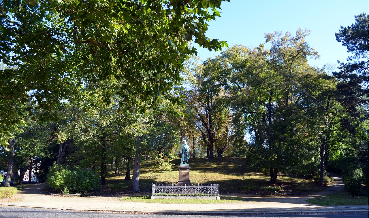 Braunschweig, Gaußberg: Blick vom Inselwall, Richtung Nordnordost zum Gauß-Denkmal (im Hintergrund der Gaußberg).